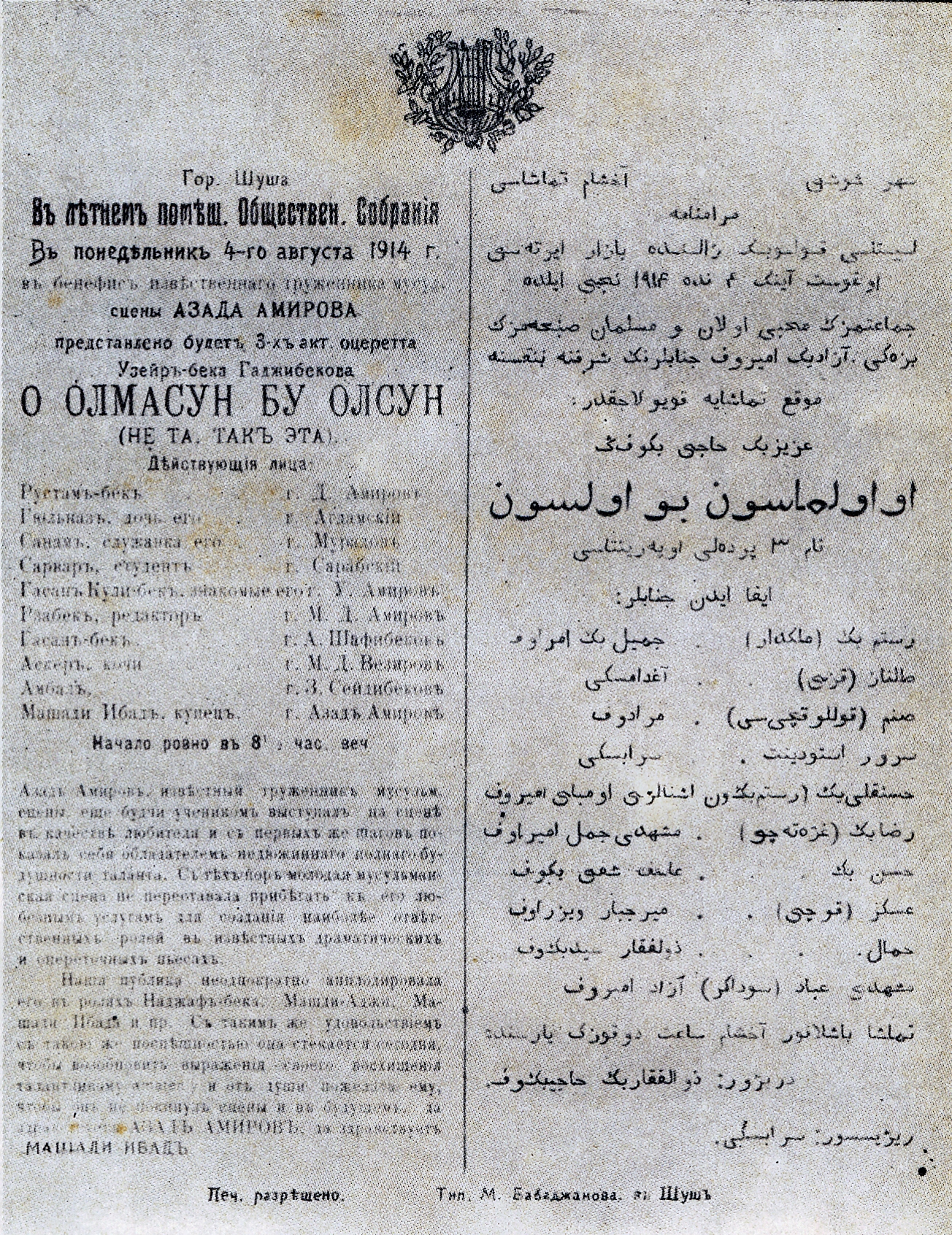 Программа одного из спектаклей музыкальной комедии "О олмасын, бу олсун" (If Not That One, Then This One). Шуша, 1914 год